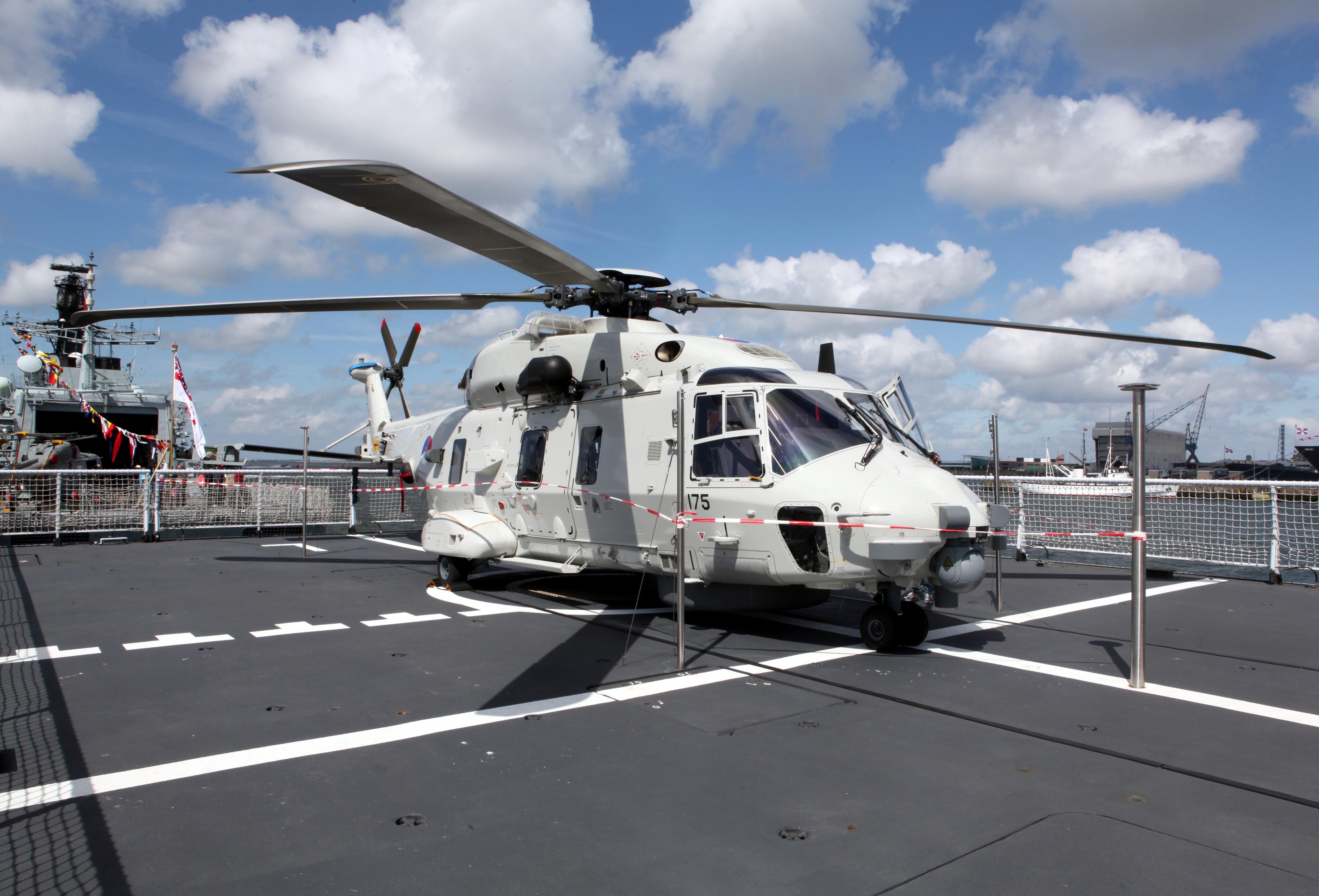 NH-90 NATO Frigate Helikopter (NFH). N 175